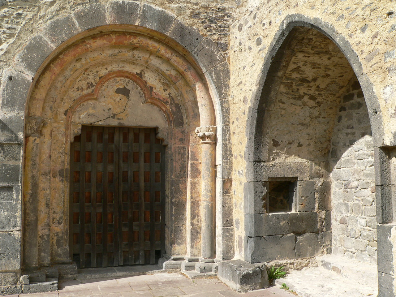 Mönchspforte Kloster Arnsburg bei Lich, Hessen, Germany